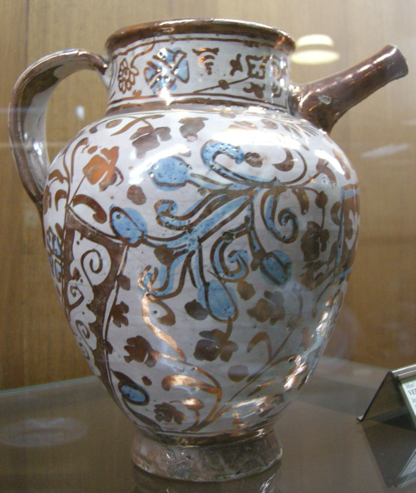 C.sf., uel (saragoza), versatoio, inizi XVII sec.